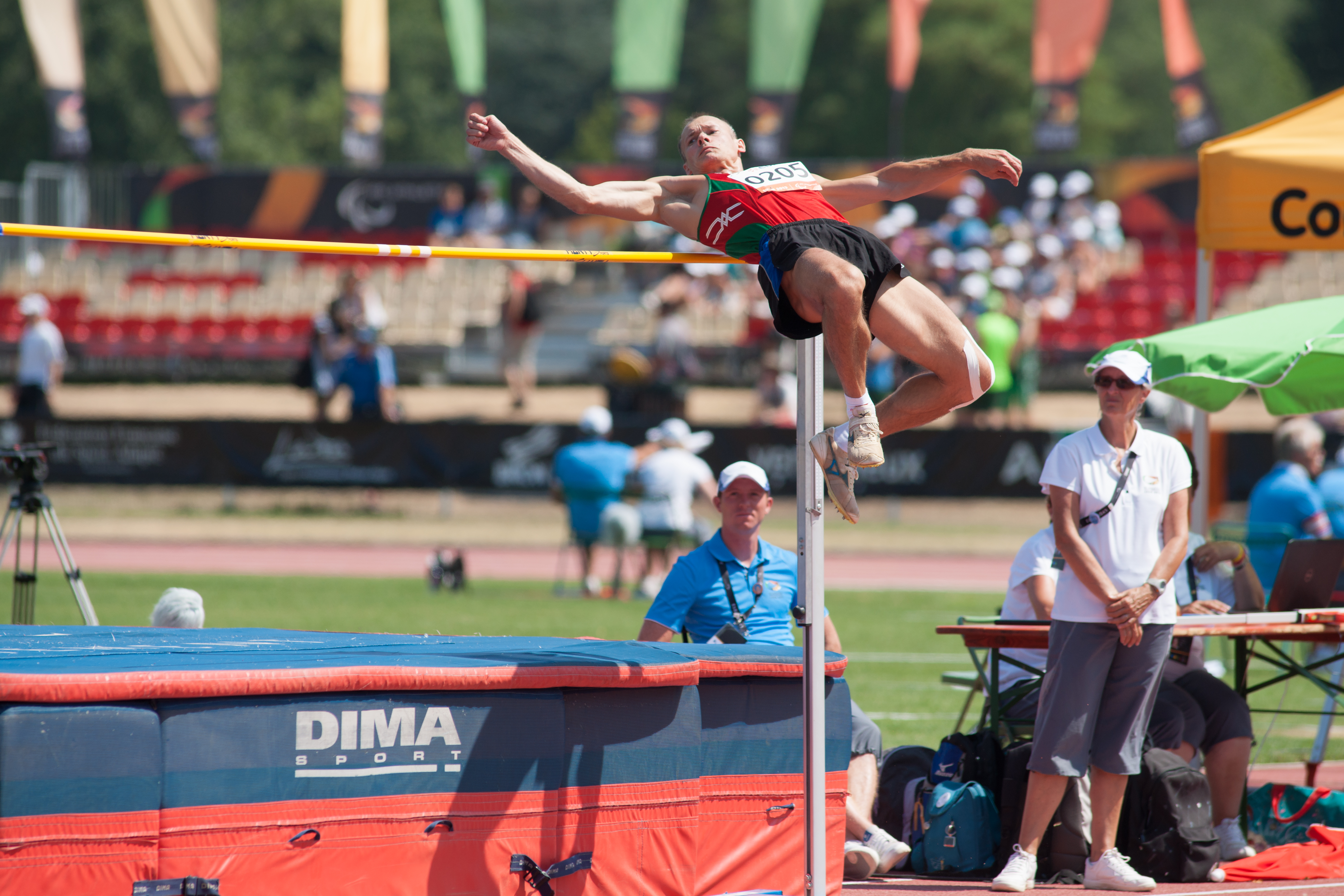 Championnats du monde d'athlétisme handisport 2013.